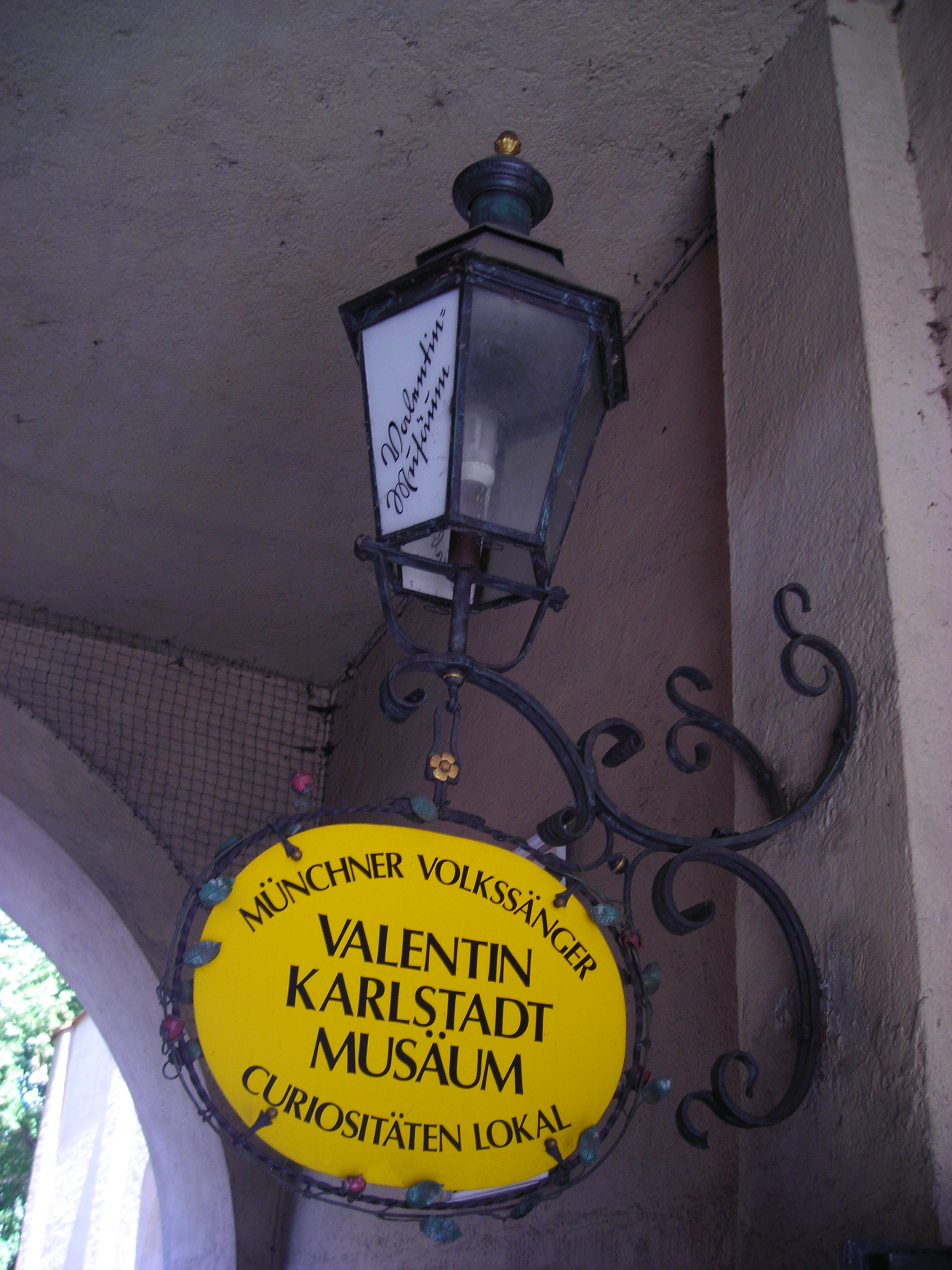 Munich Valentin-Musäum (Isartor) — Schild